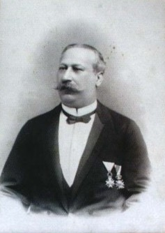 Josef Inwald (1837 - 1906), Český a rakouský podnikatel a politik.